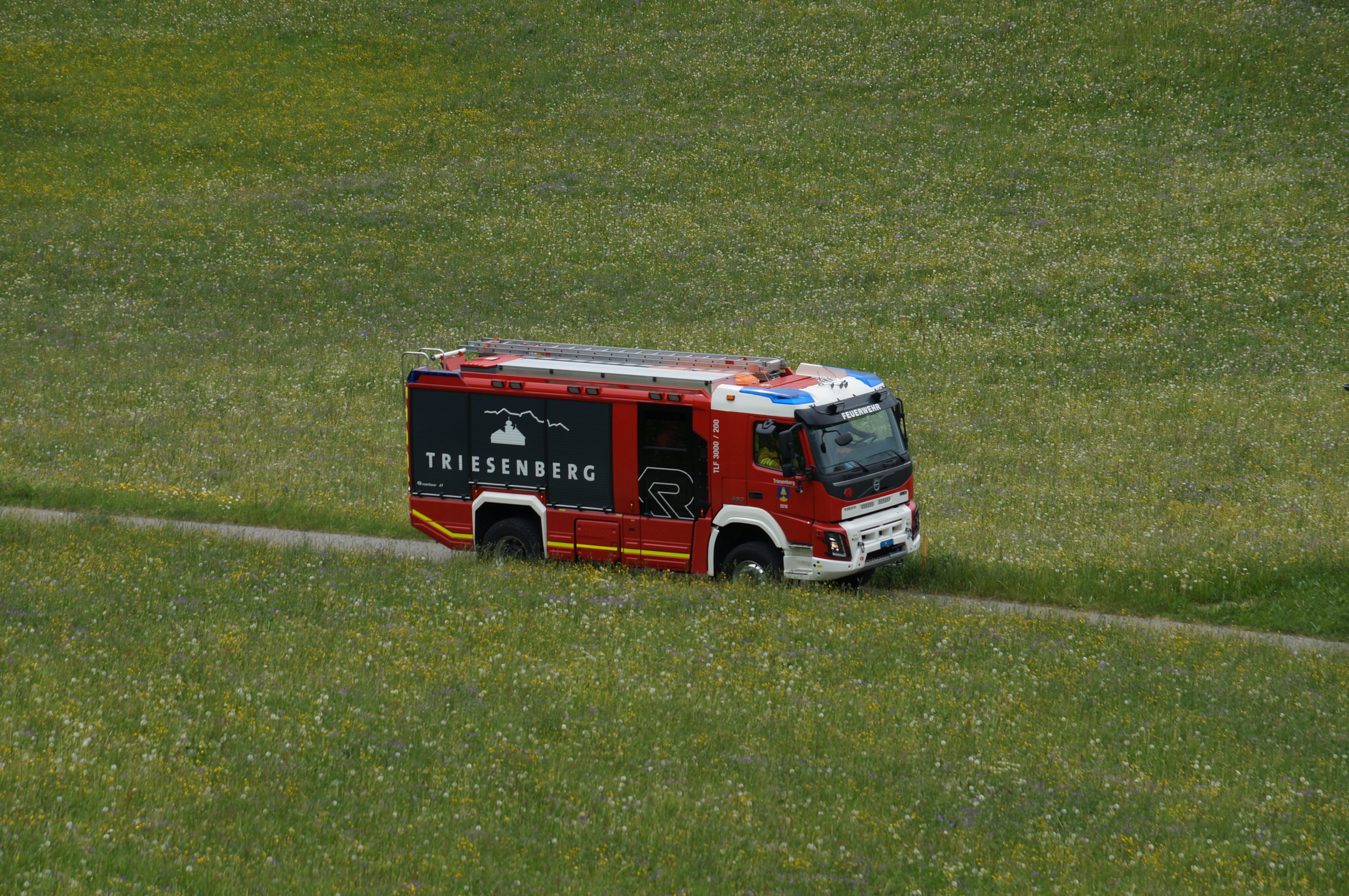 Freiwillige Feuerwehr Triesenebrg: Löschafhrzeug auf Gnalp